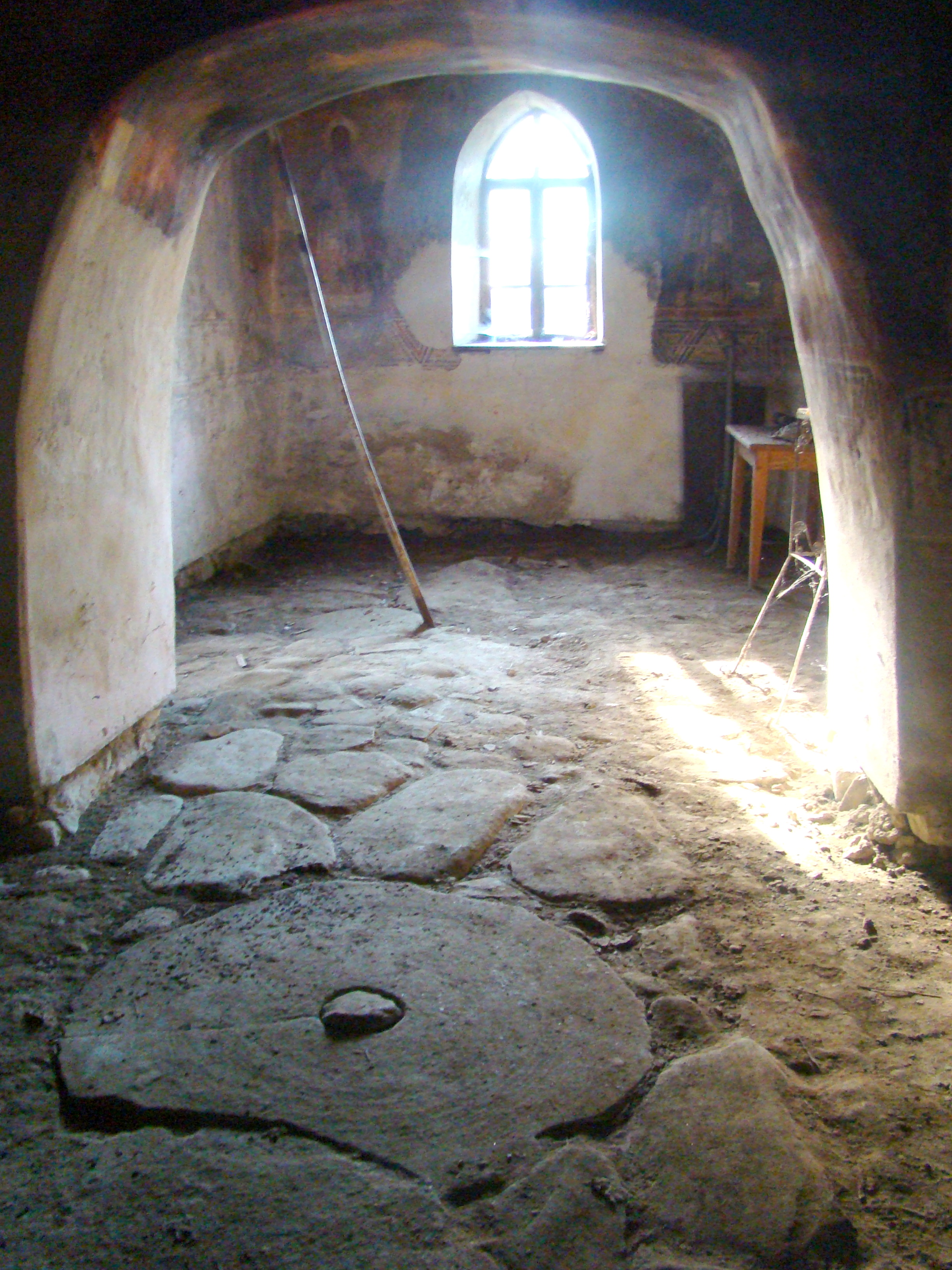 Biserica „Sfântul Prooroc Ilie”, sat Baru; comuna Baru